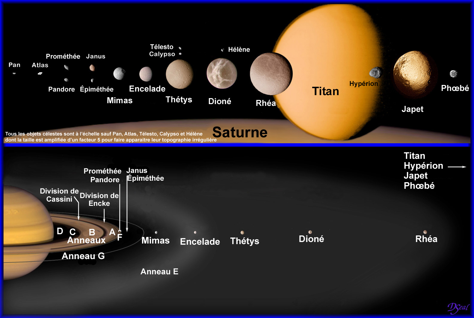 Le système de Saturne : lunes et anneaux (légendes en français)